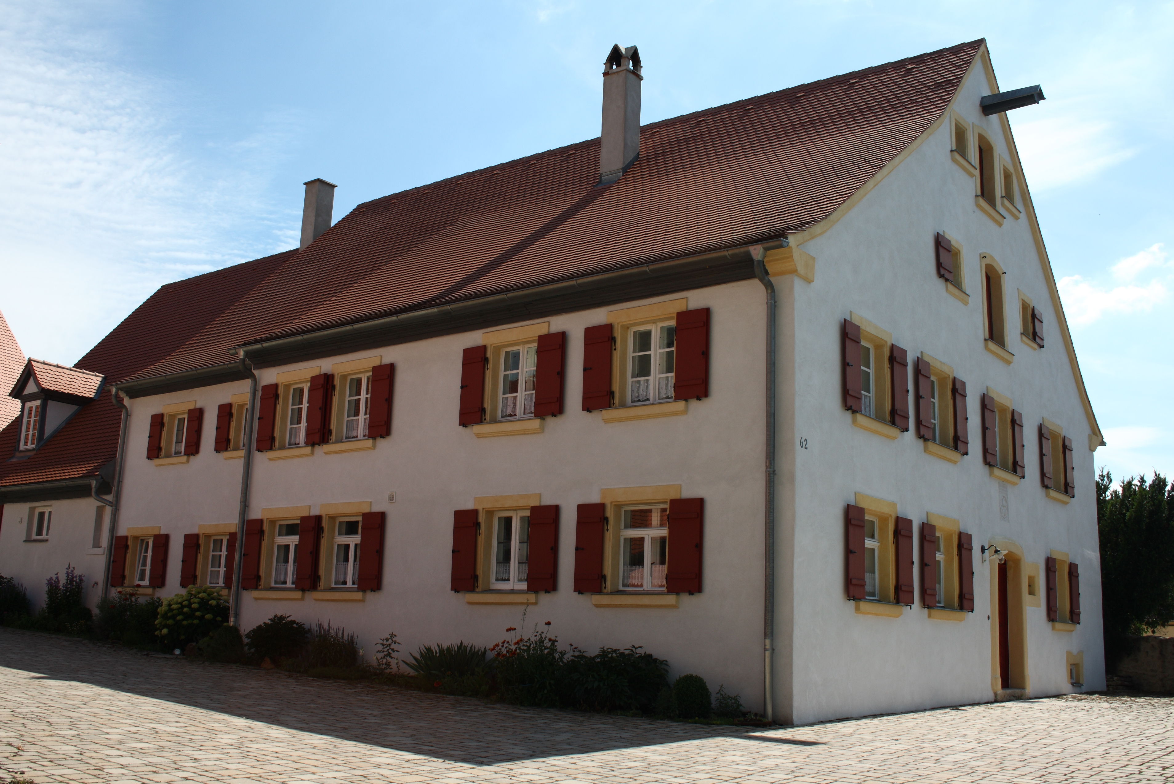 Wohnhaus in Geilsheim, einem Stadtteil von Wassertrüdingen im Landkreis Ansbach (Bayern/Mittelfranken), Geilsheim 62, Dreiseithof, ursprünglich von 1647